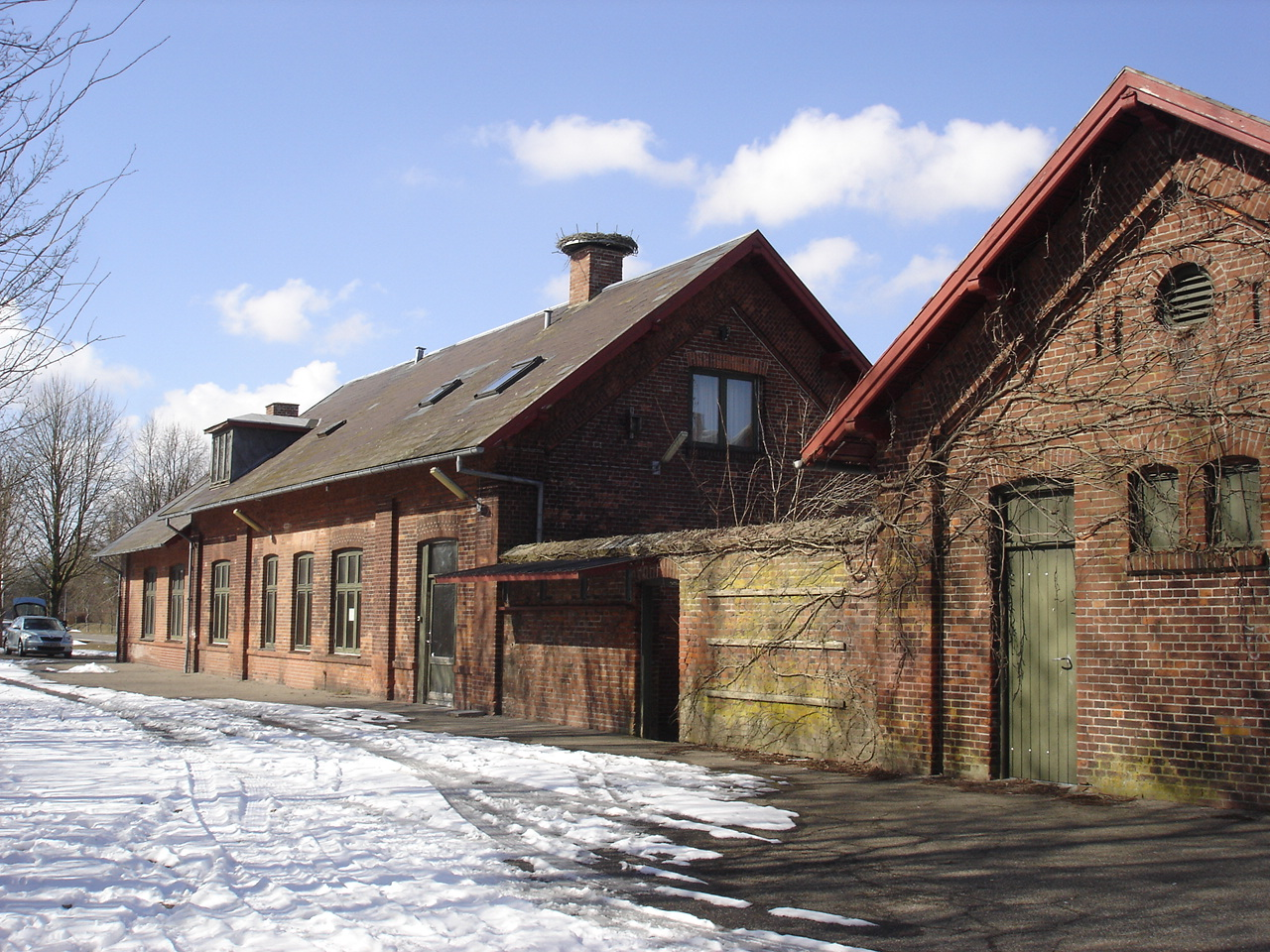 Nørager Station, sporsiden fra Ø